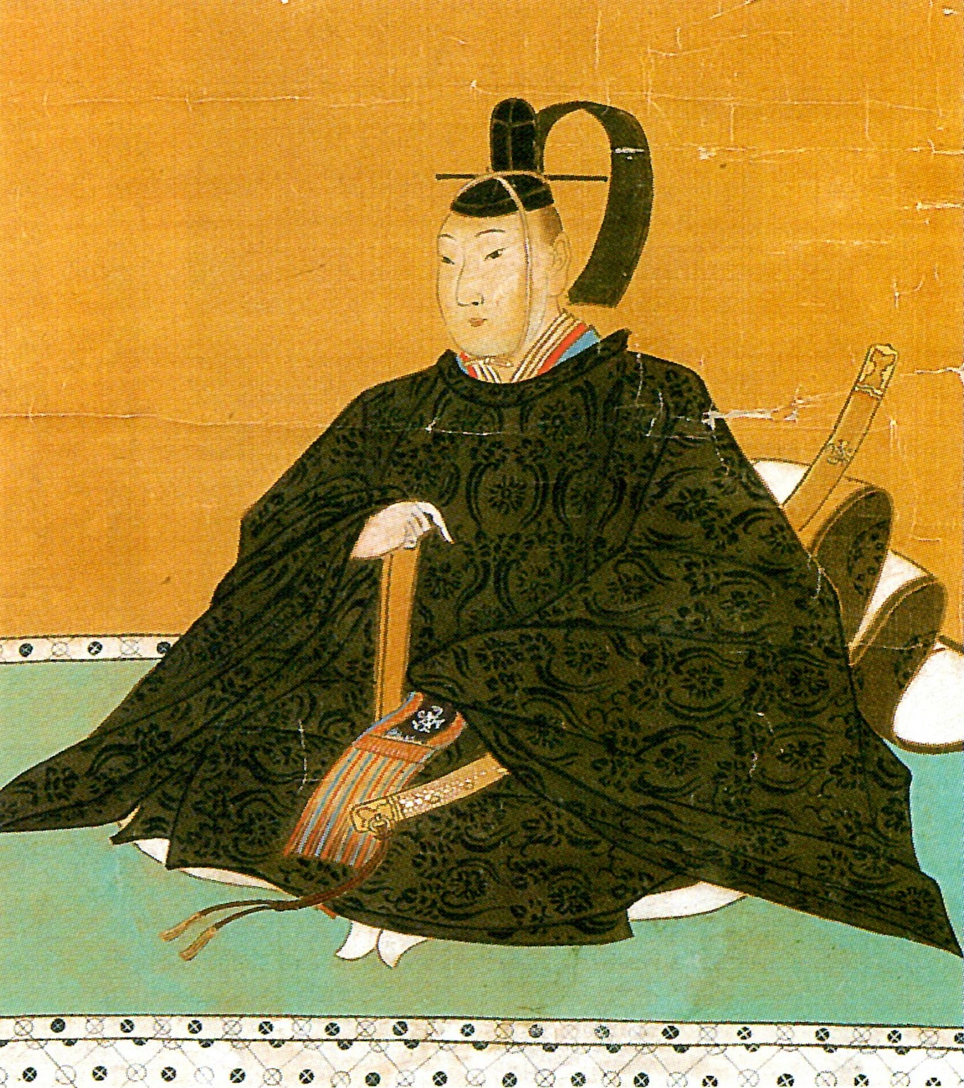 立花鑑寿の肖像。